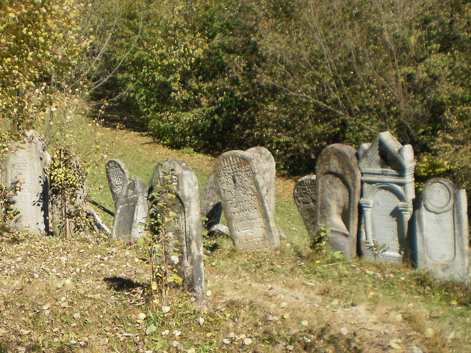 Еврейское кладбище в селе Богдан (Закарпатская область)